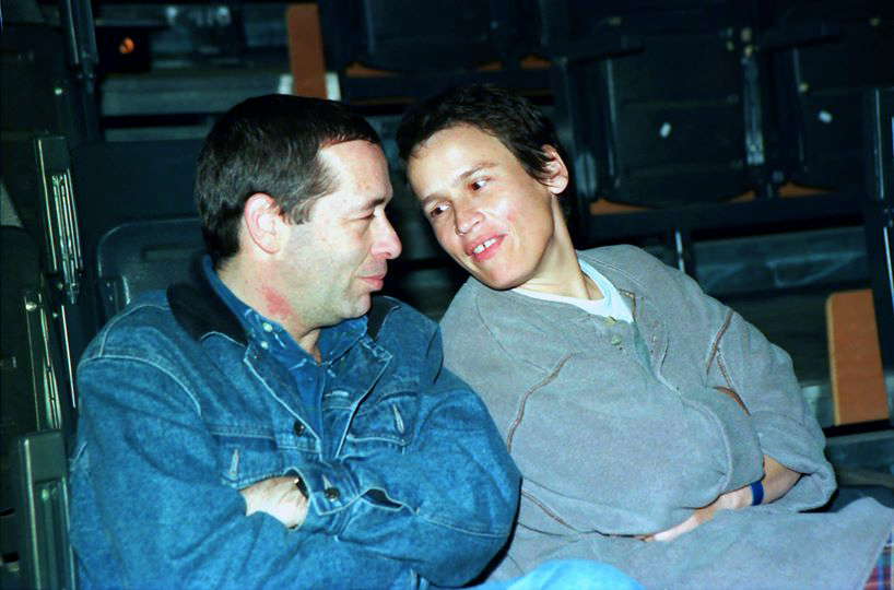 ורדי כהנא ודני וסלי